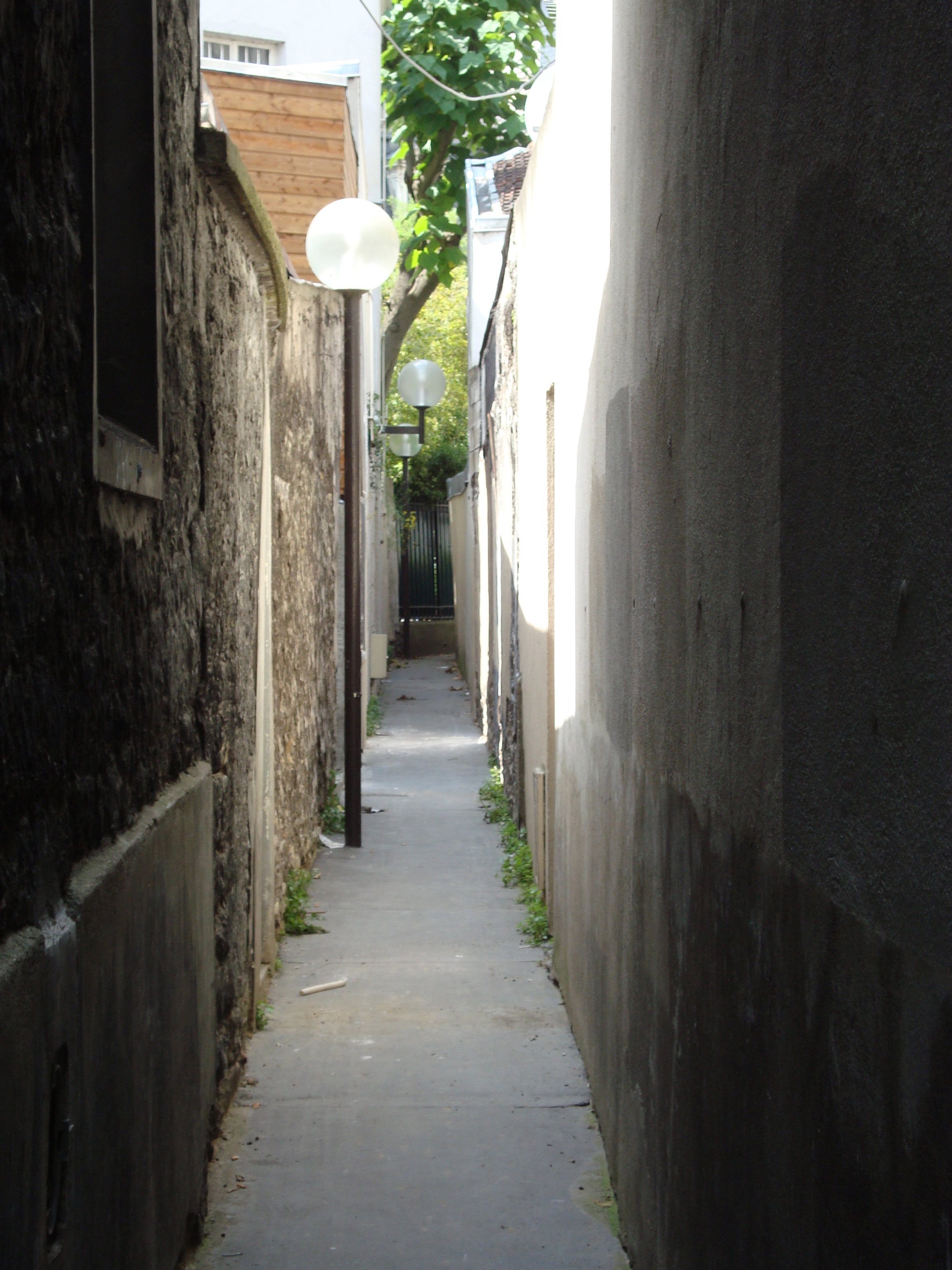 Sentier des Merisiers dans le 12e arrondissement de Paris, considéré comme l'un des plus étroit de la capitale.